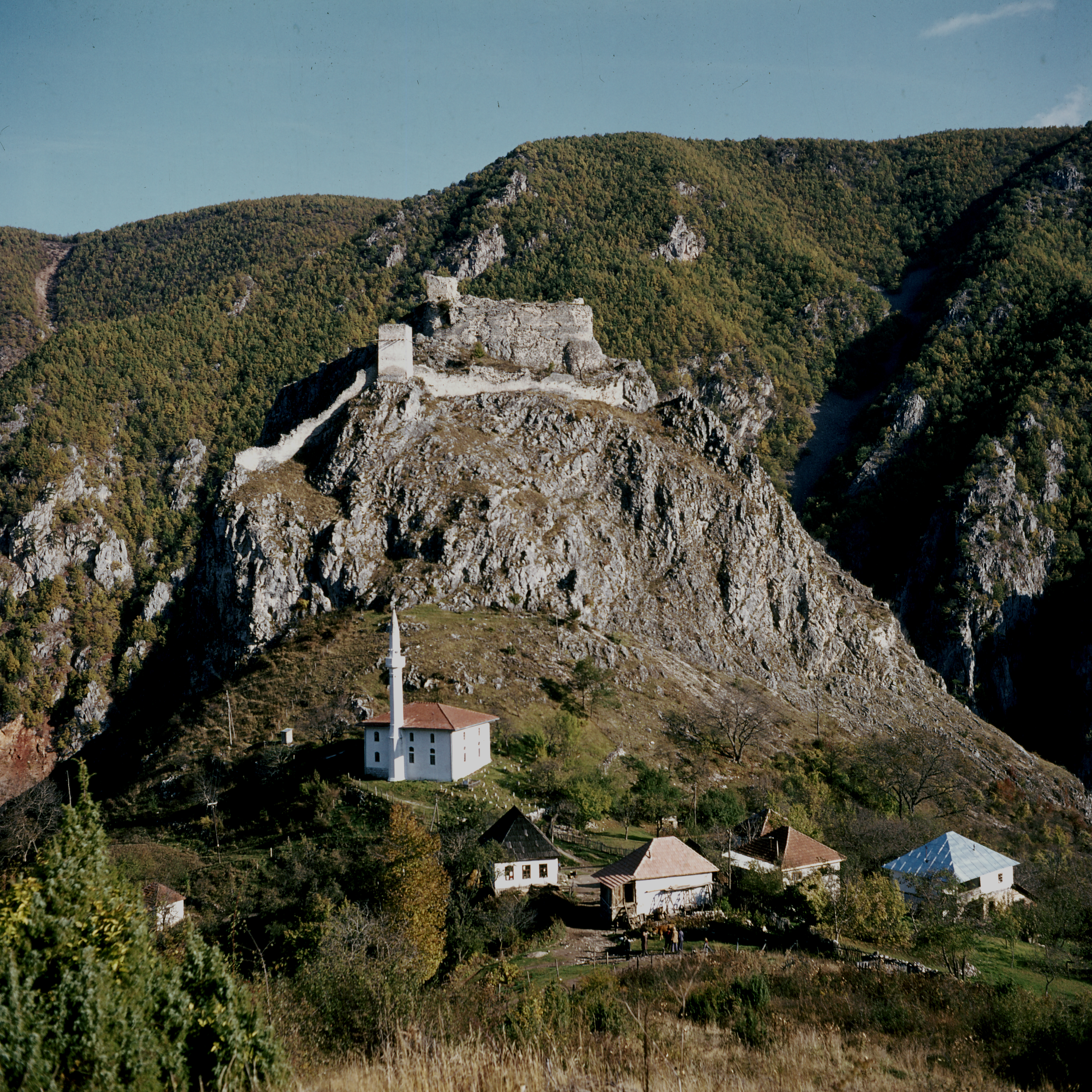 Налази се недалеко од манастира Милешеве